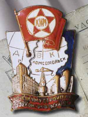 Знак "Почётному строителю Комсомольска. 1932-1937." Знаками награждались сотрудники НКВД, заключенные, вольнонаемные, строители.